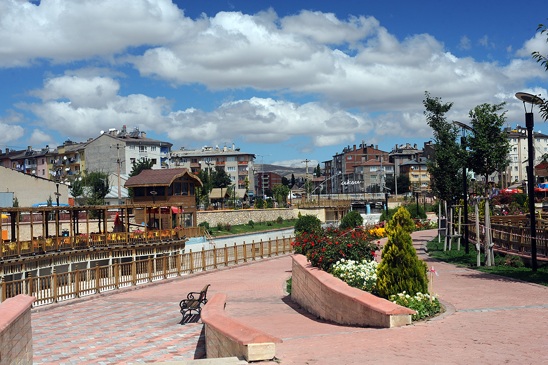 Sivas AKSU Deresi